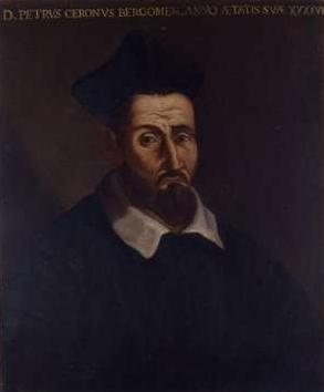 Depicted person: Domenico Pietro Cerone